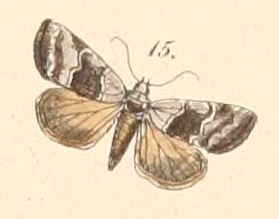 Abacena accincta (Felder & Rogenhofer 1874)